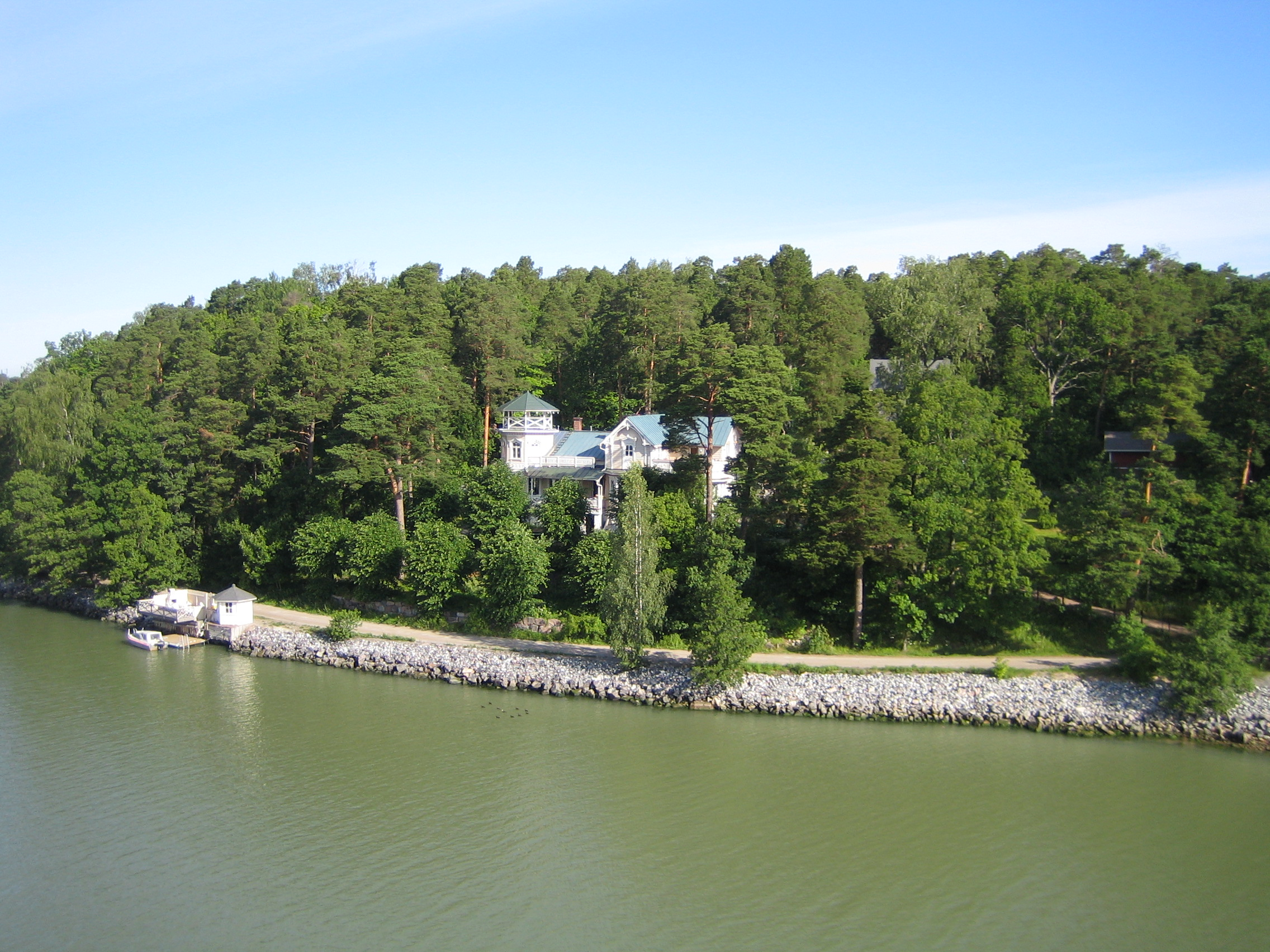 (2008-07-07T09-09-50.jpg)